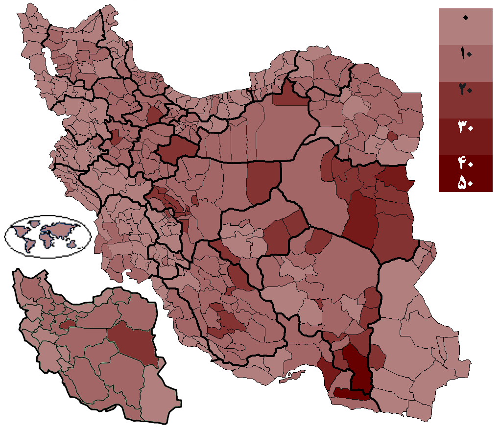 درصد رای سعید جلیلی انتخابات ریاست‌جمهوری ایران (۱۳۹۲) به تفکیک شهرستان. Provinces of Iran